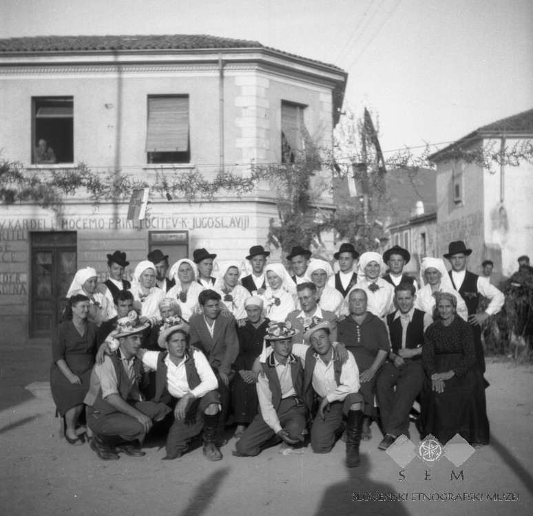 Pred slovesom pri brškem opasilu.